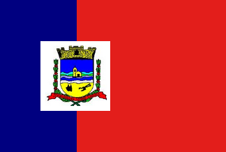 Bandeira de Mirandópolis - SP - Brasil.